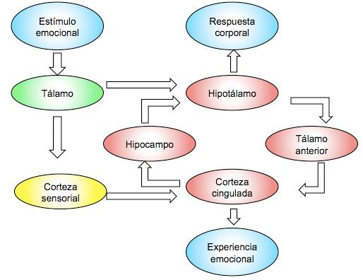 En 1937, James Papez sugirió un esquema anatómico para el circuito neural de la emoción, conocido como el circuito de Papez (Papez, 1937). El circuito comienza cuando un estímulo emocional se presenta, este llega directamente al tálamo, donde va a la corteza sensorial y al hipotálamo, cuando la información proveniente de estas dos estructuras es integrada por la corteza cingulada ocurre la experiencia emocional, es decir las sensaciones se convierten en percepciones, pensamientos y memorias. Papez demostró que la corteza cingulada y el hipotálamo están interconectados mediante el núcleo anterior del tálamo, el hipocampo y los cuerpos mamilares, y que estás conexiones son necesarias para el control cortical de la expresión emocional.